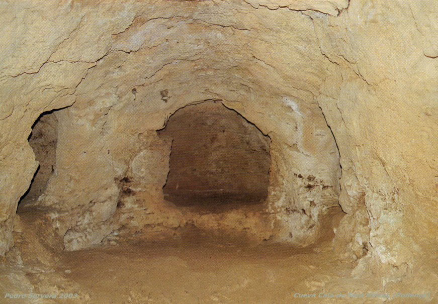 ... Sonstiges:zeigt den Innenraum der Höhle Necròpoli de Cala Sant Vicenç